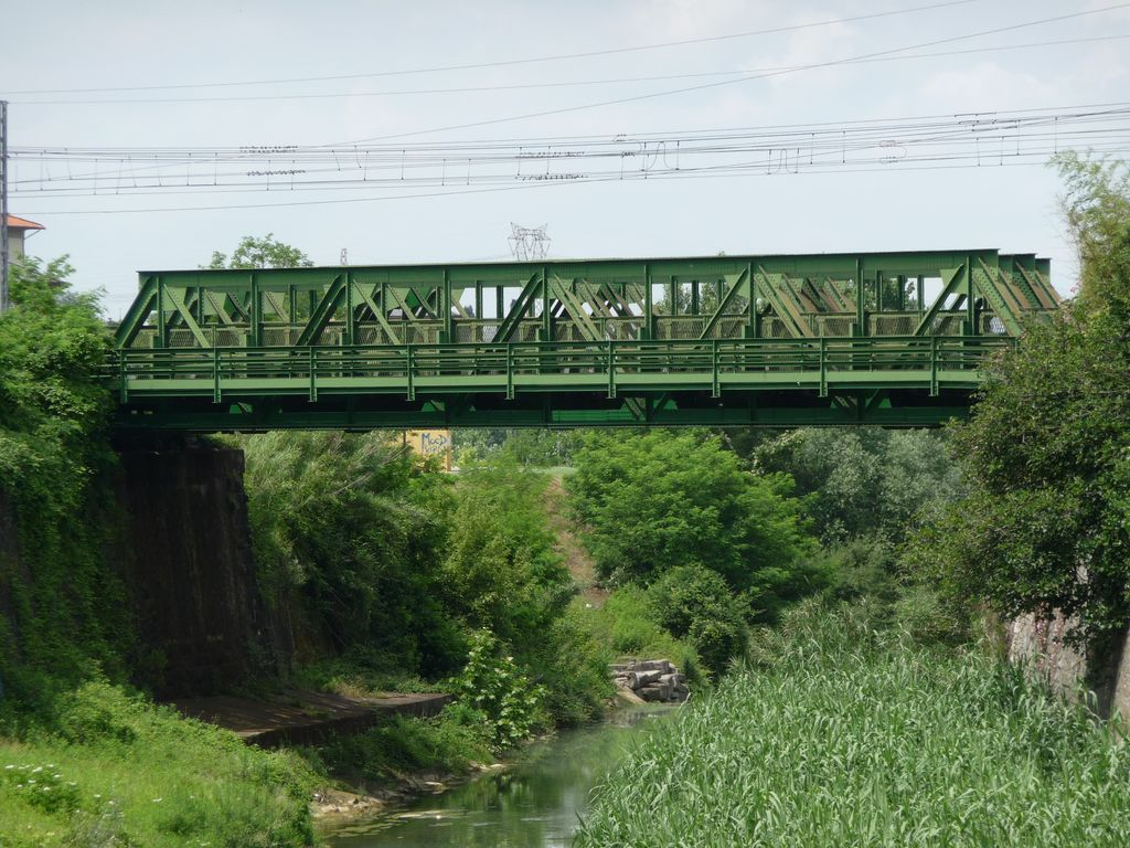 Ponte ferroviario in ferro, pressi stazione di Montelupo Capraia - Il ponte è sul fiume Pesa (affluente del fiume Arno)